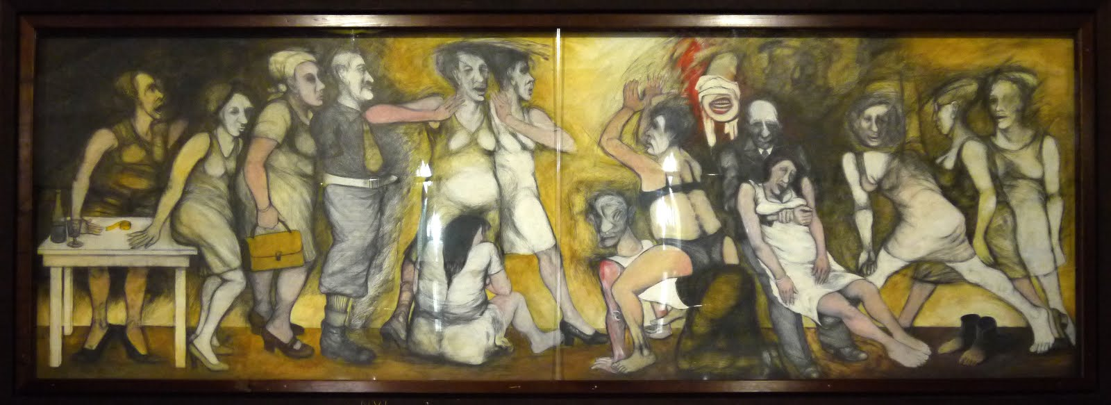 Alterlaa Kunst am Bau Adolf Frohner „Künstler und Gesellschaft“